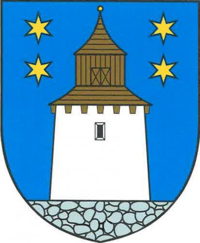 Znak, Korouhev, okres Svitavy